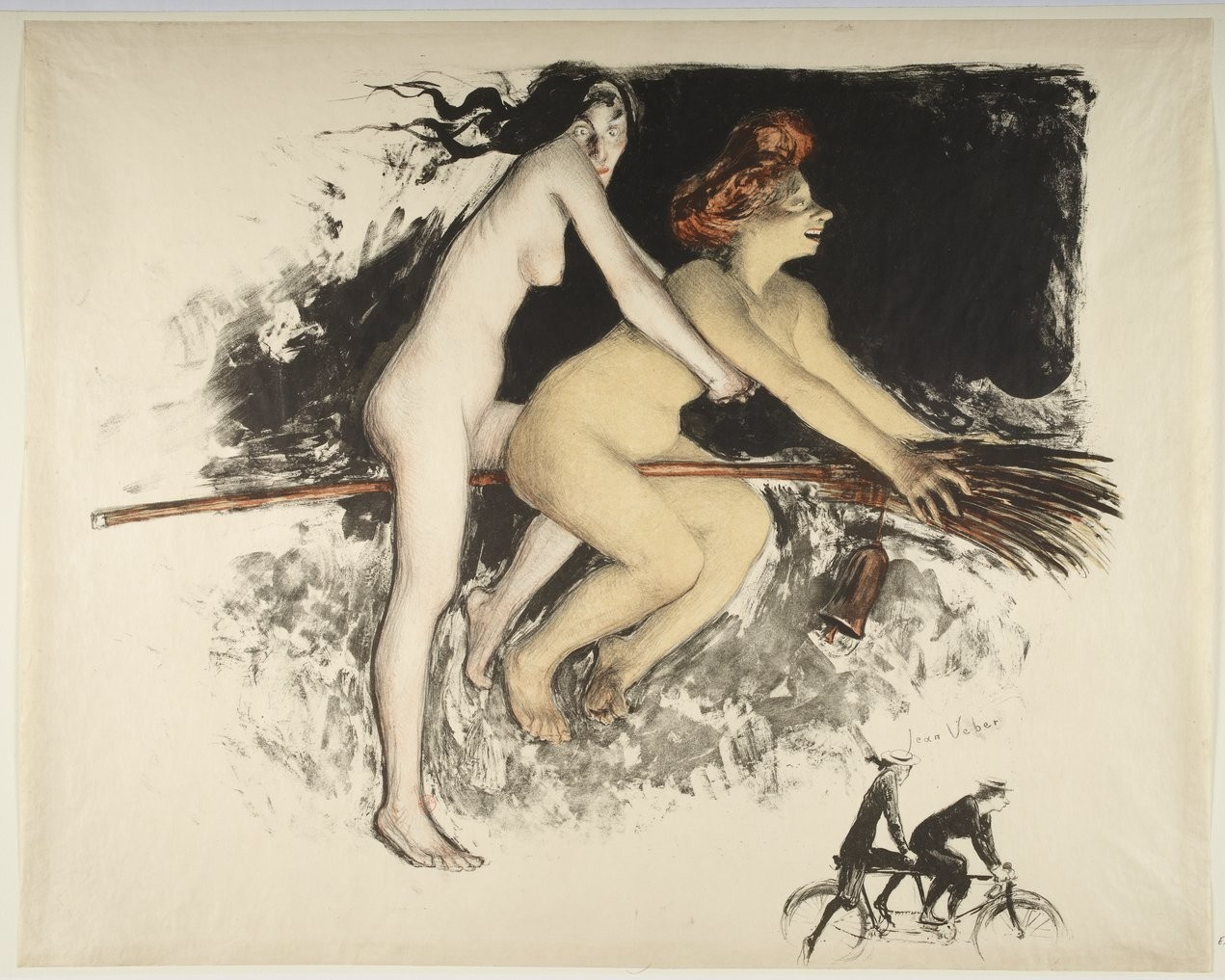 Jean Veber, Les Sorcières ou Tandem (1900); lithographie en coul. ; 56,7 x 45,2 cm (f.); Éditeur : Duchâtel ([Paris])